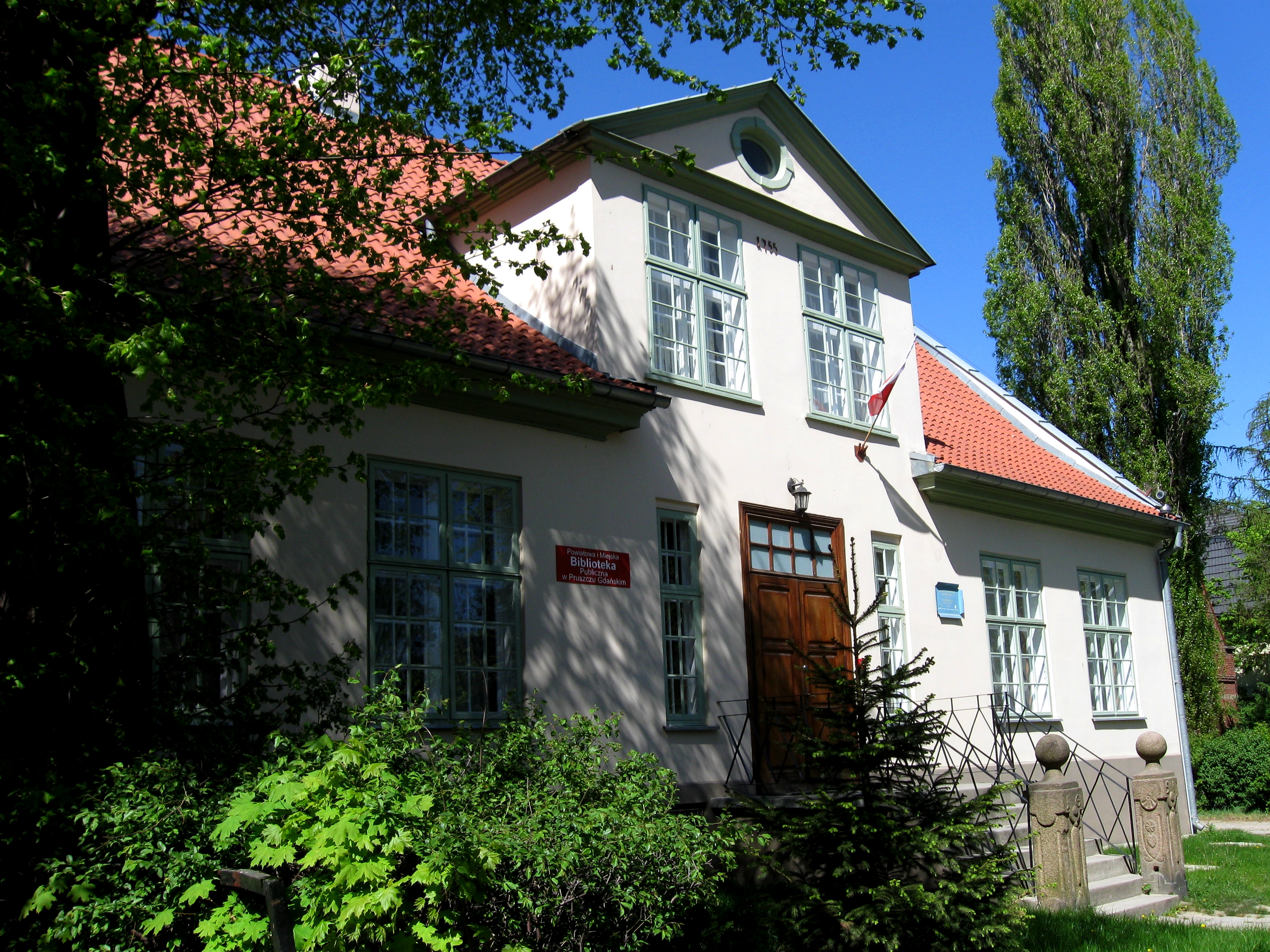 Pruszcz Gdański, dawna plebania przy kościele p.w. Św. Krzyża (obecnie biblioteka) (zabytek nr rejestr. A-220)